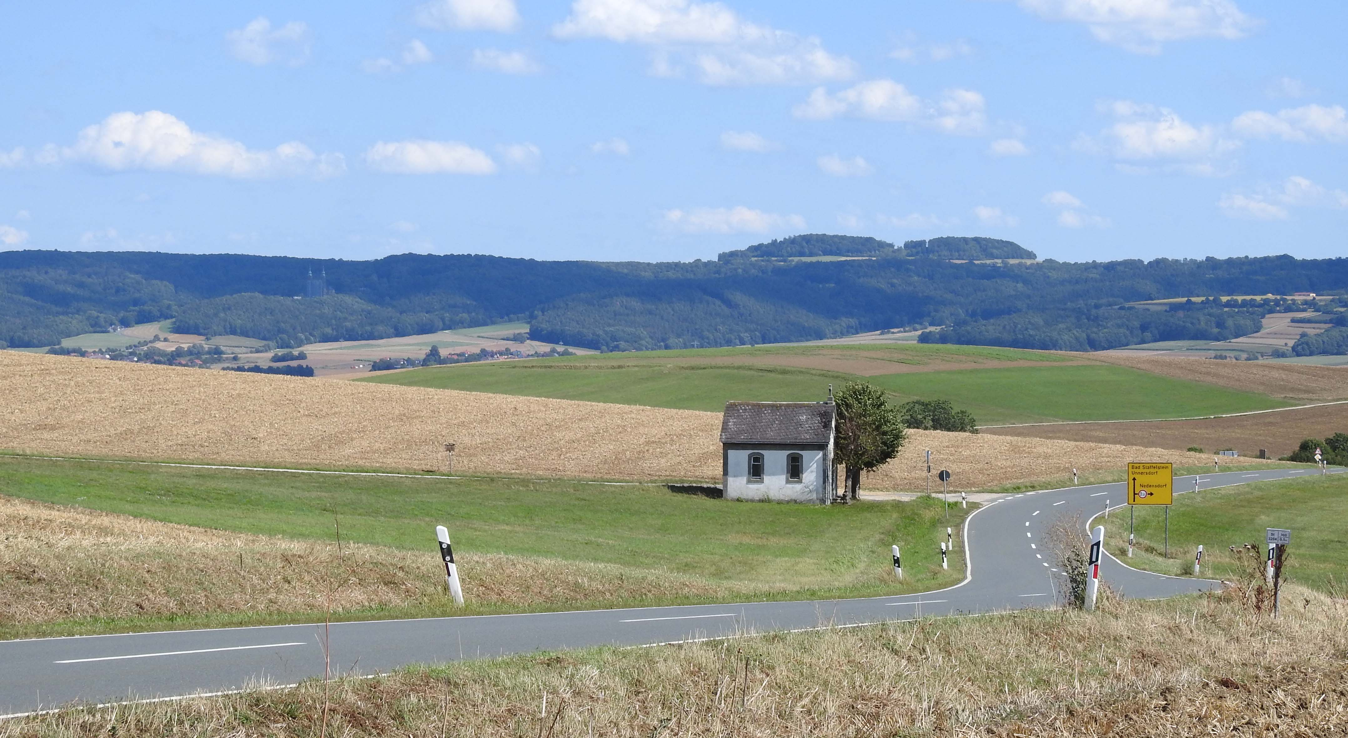 Bei Neuhof, Bad Staffelstein